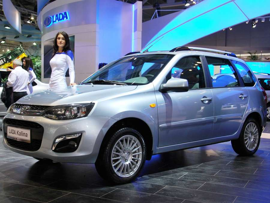 Лада Калина Универсал второй серии (ВАЗ-2194)